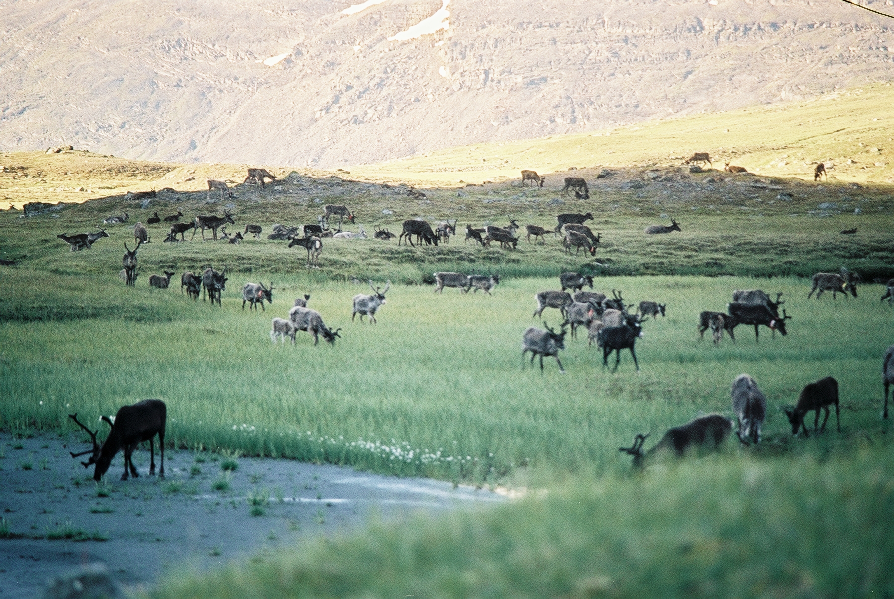 Reindeers in Sarek